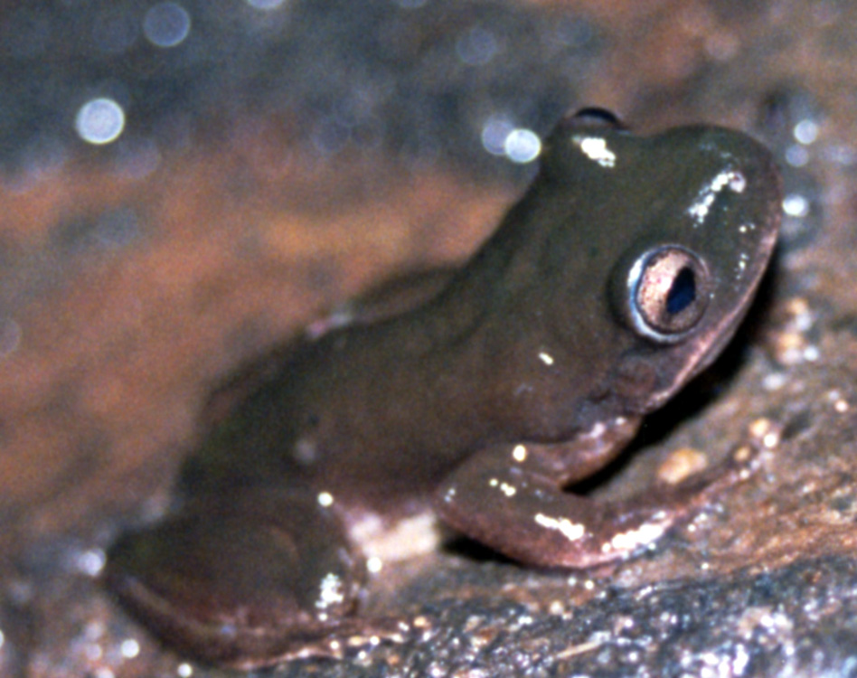 Ptychohyla salvadorensis